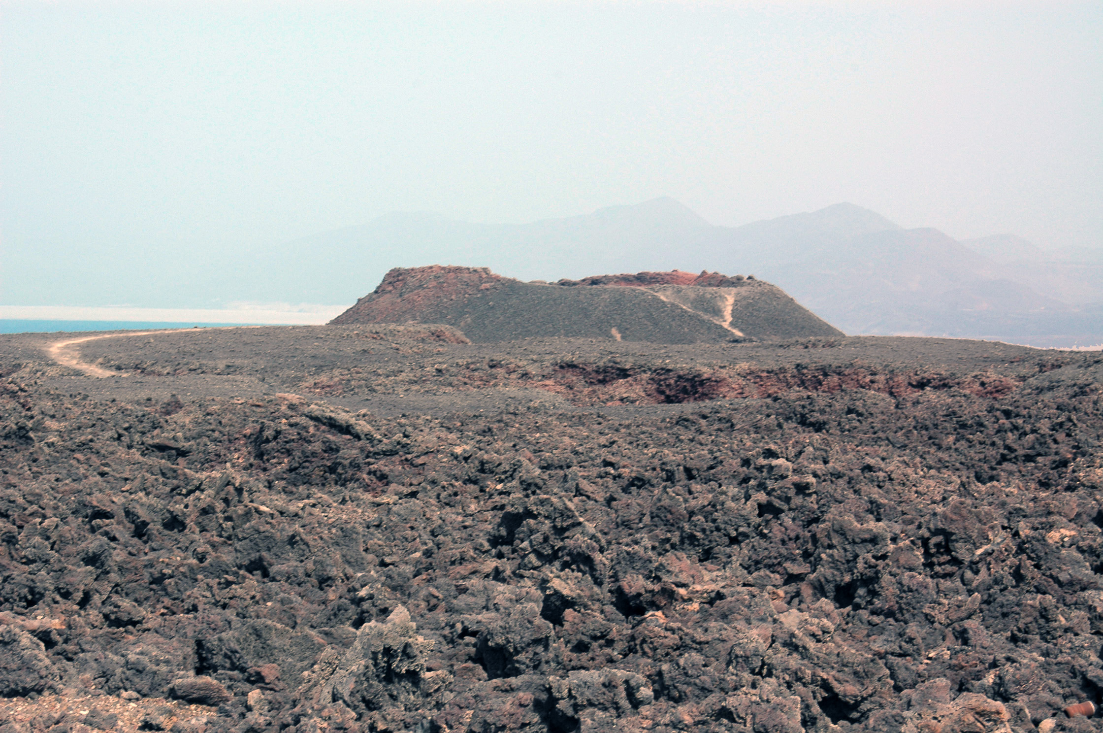 Ardoukoba